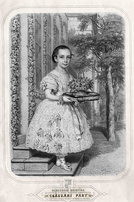 gróf Wenckheim Krisztina (1849-1924) A szabadkígyósi birtok úrnője mindössze nyolcesztendős volt, amikor 1857-ben meglátogatta a császári házaspár: Ferenc József és Erzsébet királyné. Tiszteletükre a család impozáns diadalívet emeltetett. Krisztina 1872-ben ment feleségül unokatestvéréhez, gróf Wenckheim Frigyeshez, akivel felépíttették a kastélyt.Portrait drawing or photo by Barabás.?